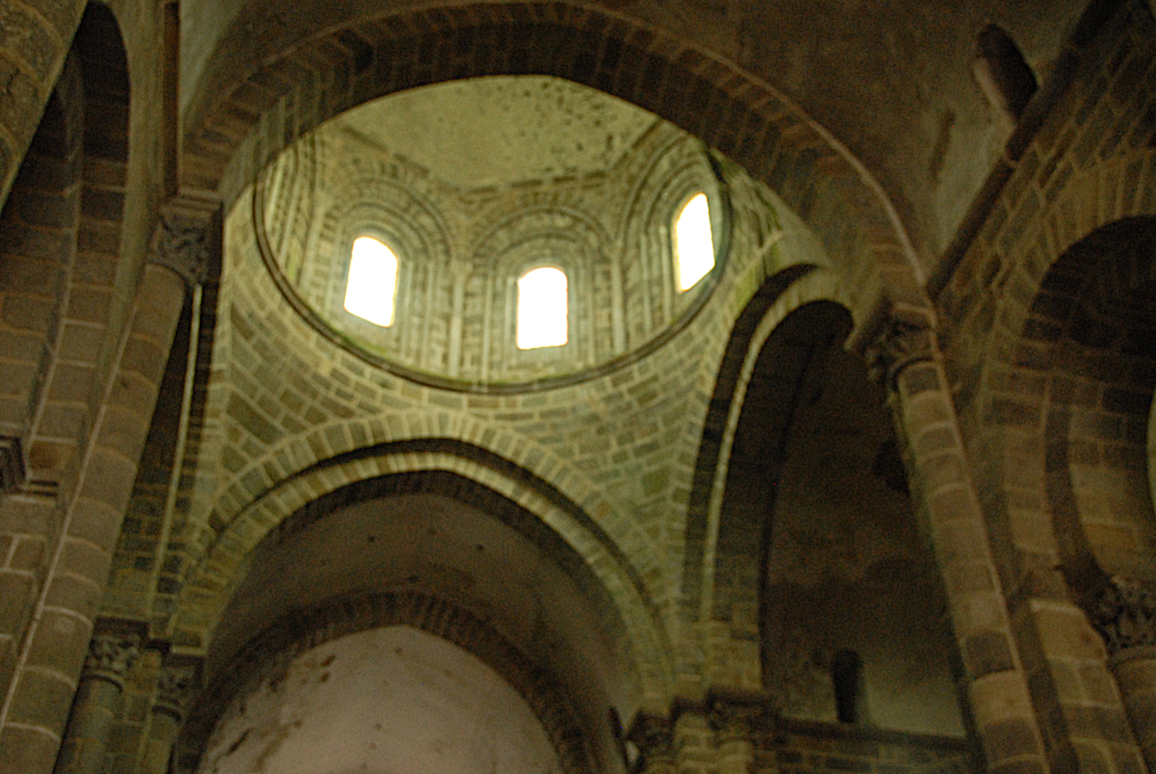 St-Pierre de Le Dorat, Vierung, Pendentifs und Tambour